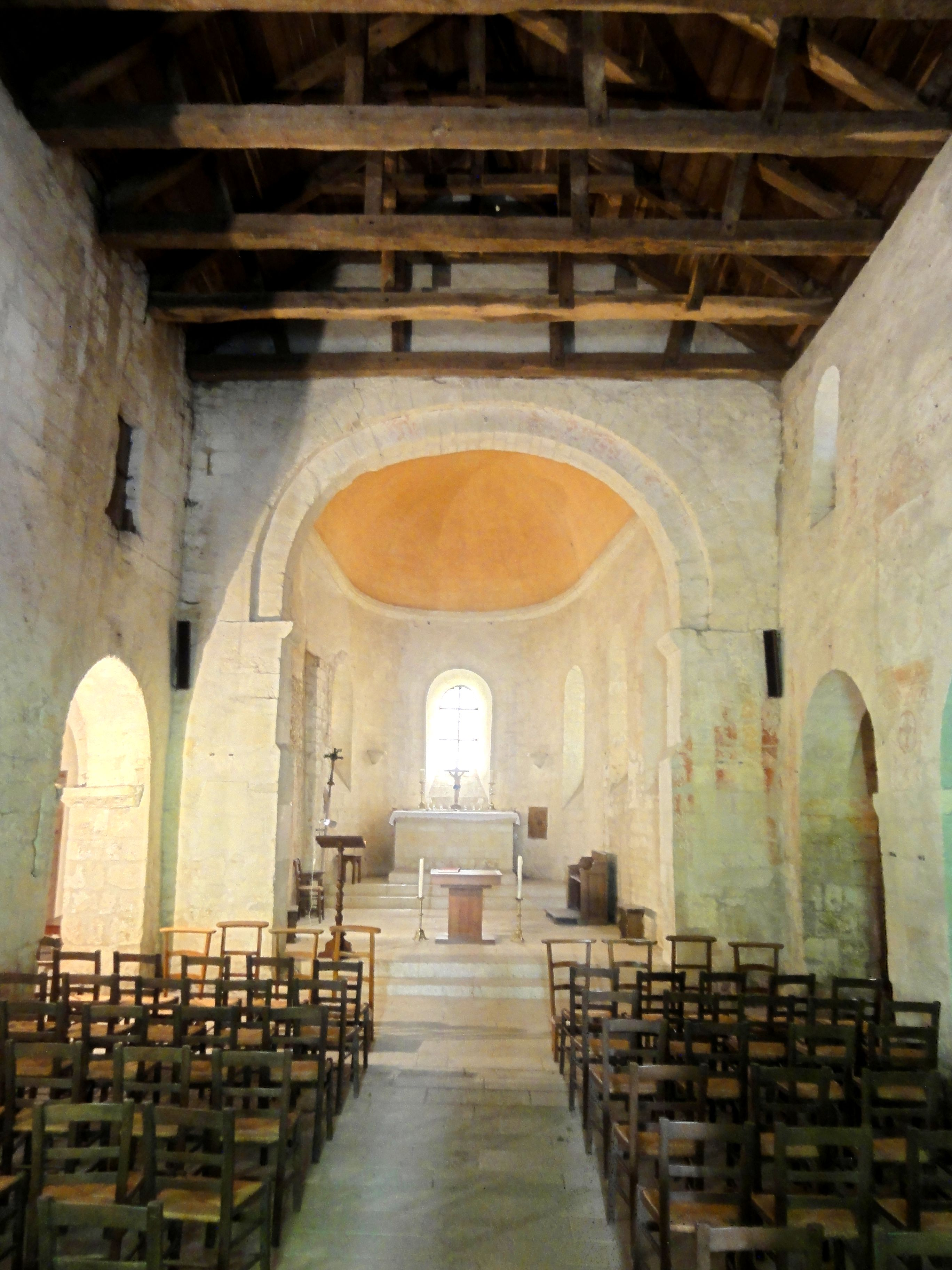 Nef, vue vers l'est.